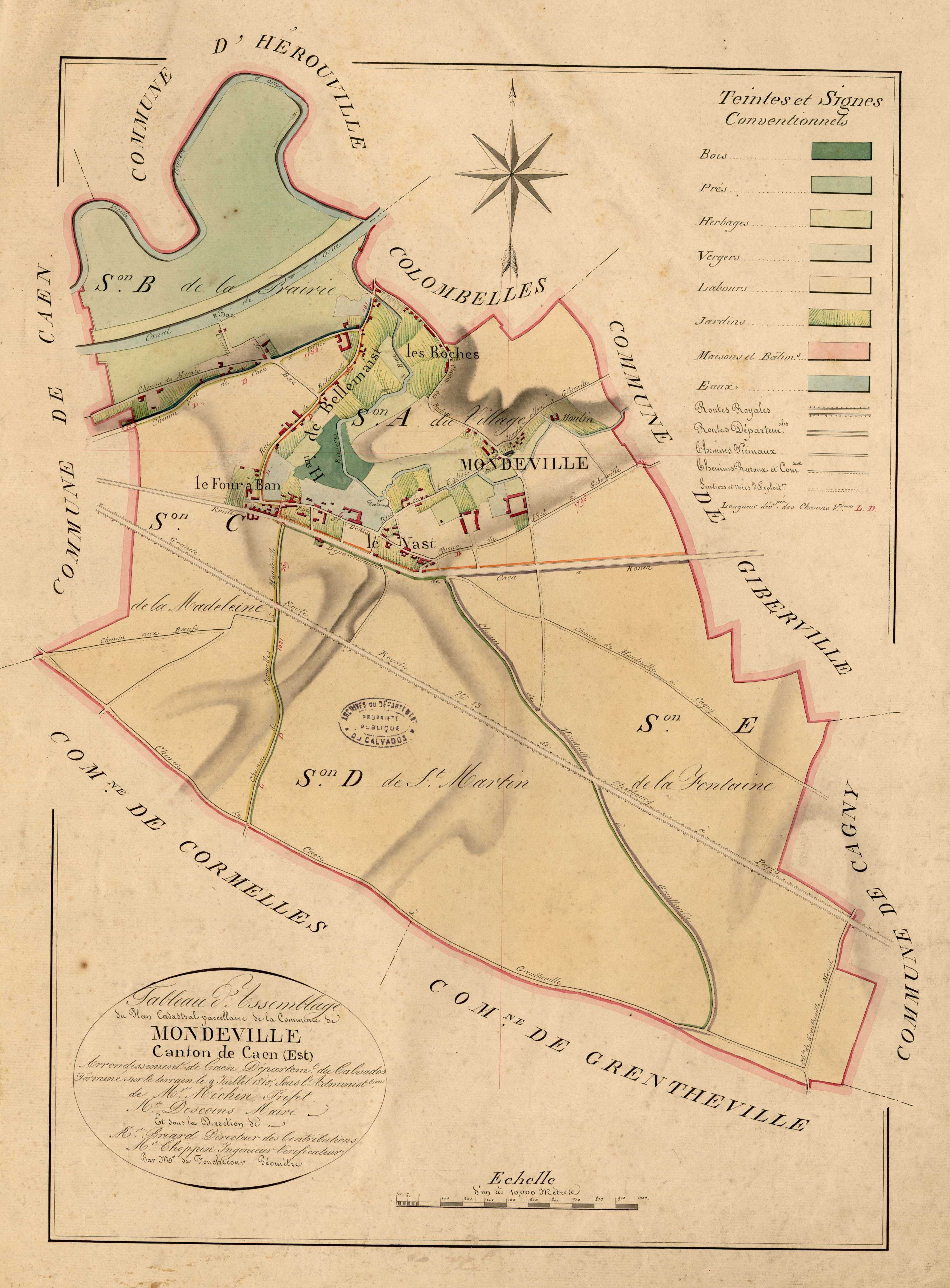 Cadastre napoléonien de Mondeville